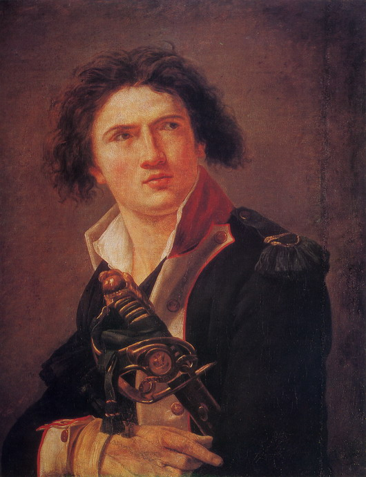 Портрет Лазаря Гоша, 1793 року: портрет роботи Ж.-Л. Давіда